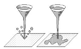 Viscocidad